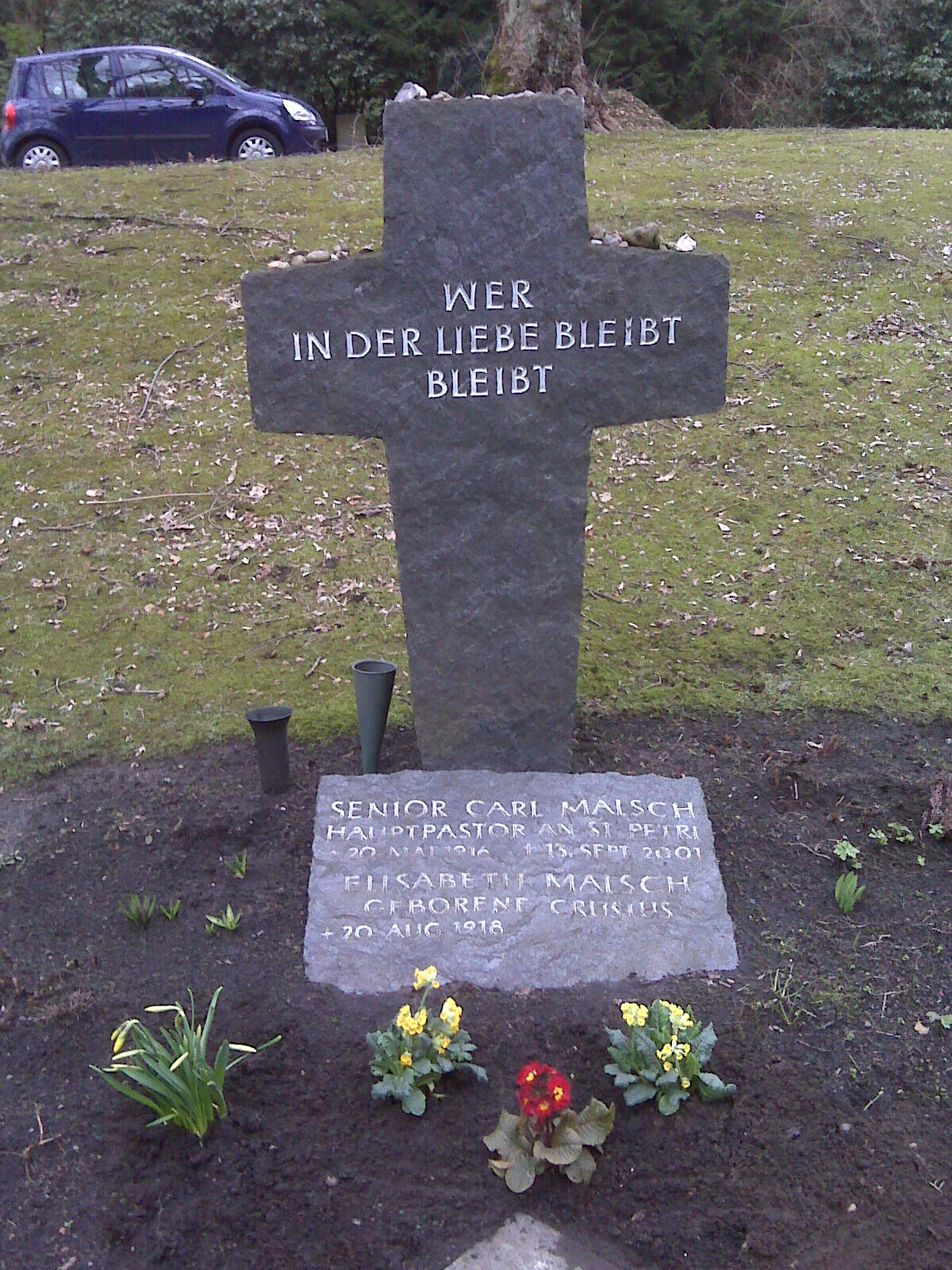 Grabkreuz des Hamburger Hauptpastors Carl Malsch